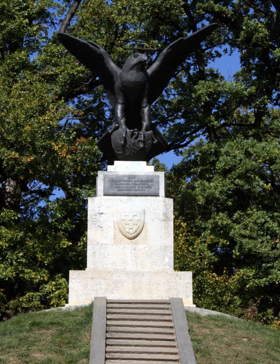 Maksimir, Zagreb